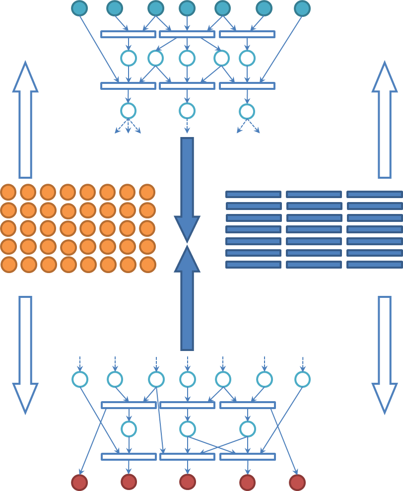 Представление миварной сети в виде двудольного графа